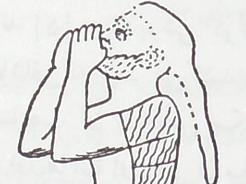 گرته‌ای فرد هوری یا لولویی از لوح نارام‌سوئن پادشاه سوم اور-وک